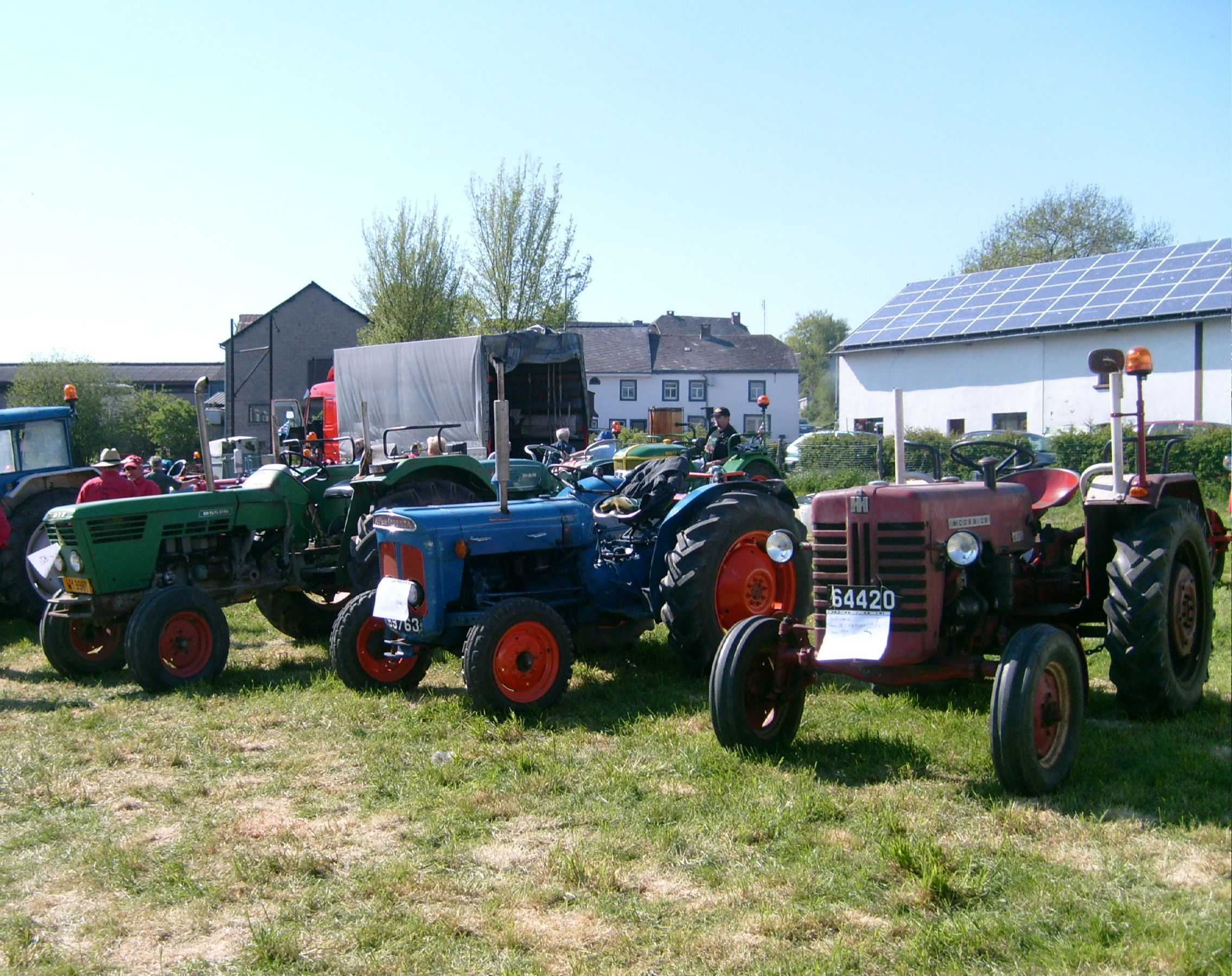 Al Trakteren um Floumaart am Mee zu Beeler, Lëtzebuerg - 11. Mee 2008